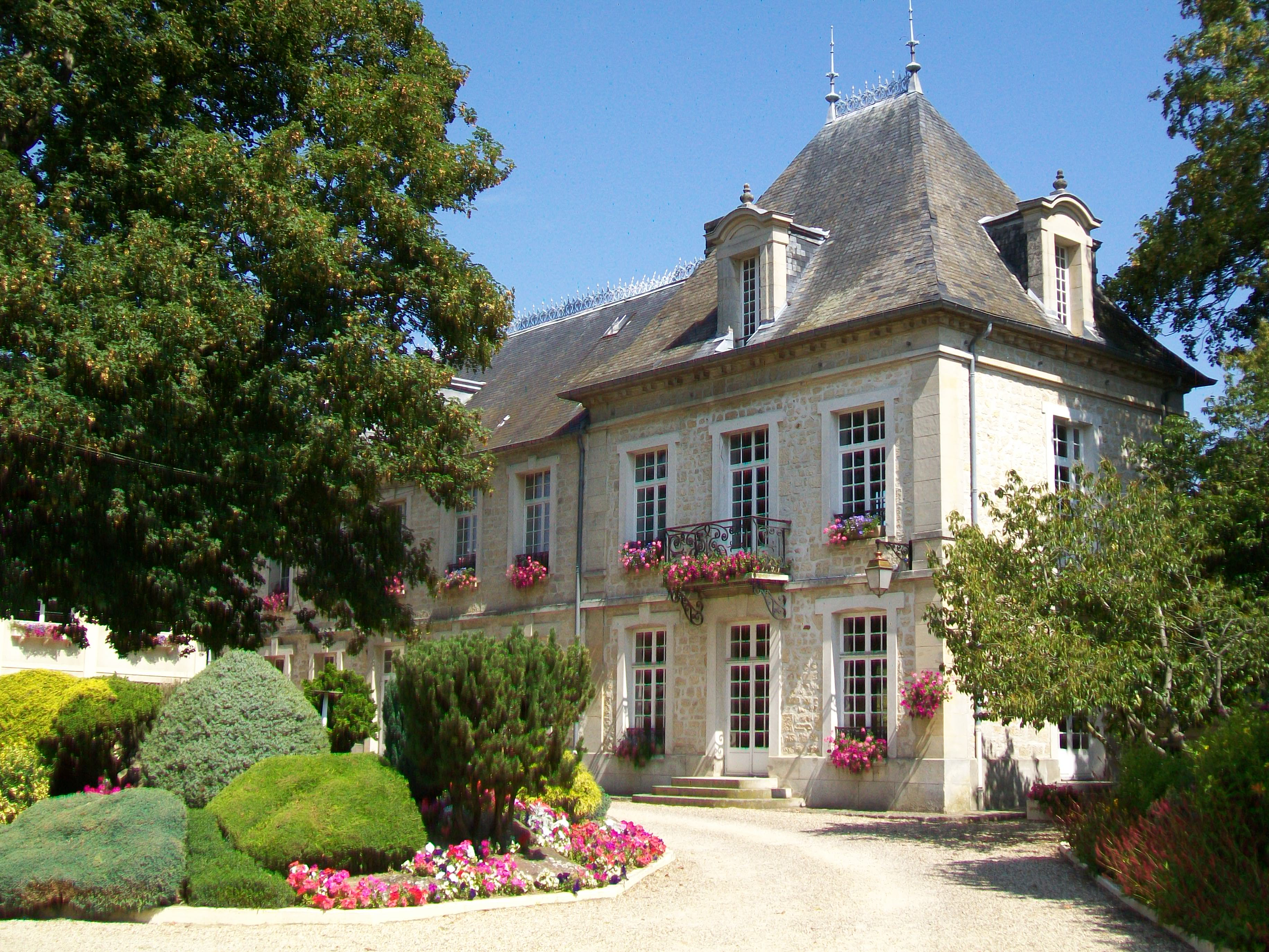 Le château des Érables, propriété de la commune, rue des Tournelles.